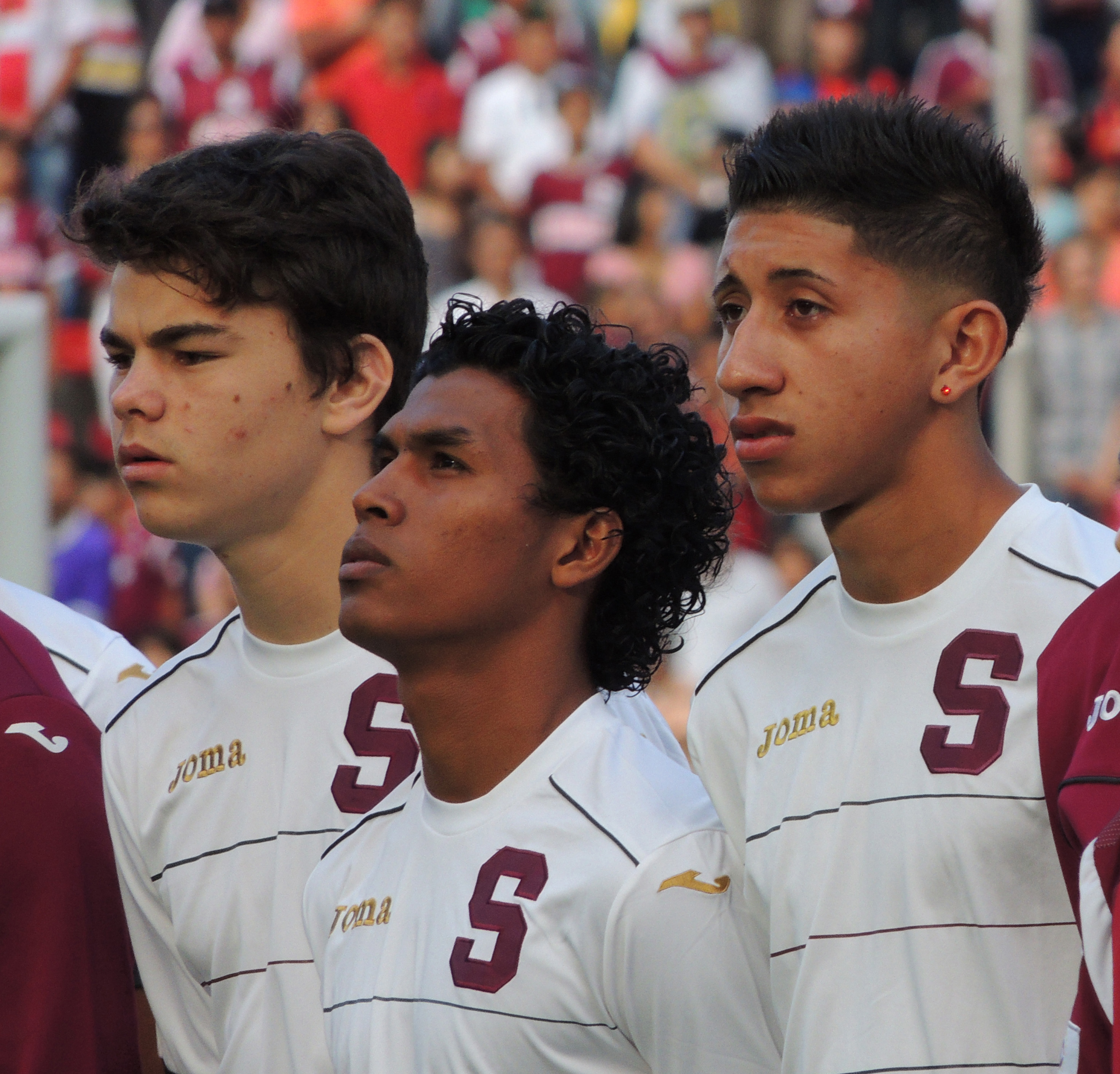 Esta obra de Luis Manuel Madrigal está bajo una licencia de Creative Commons Reconocimiento-CompartirIgual 4.0 Internacional. Para una versión sin logo escriba a